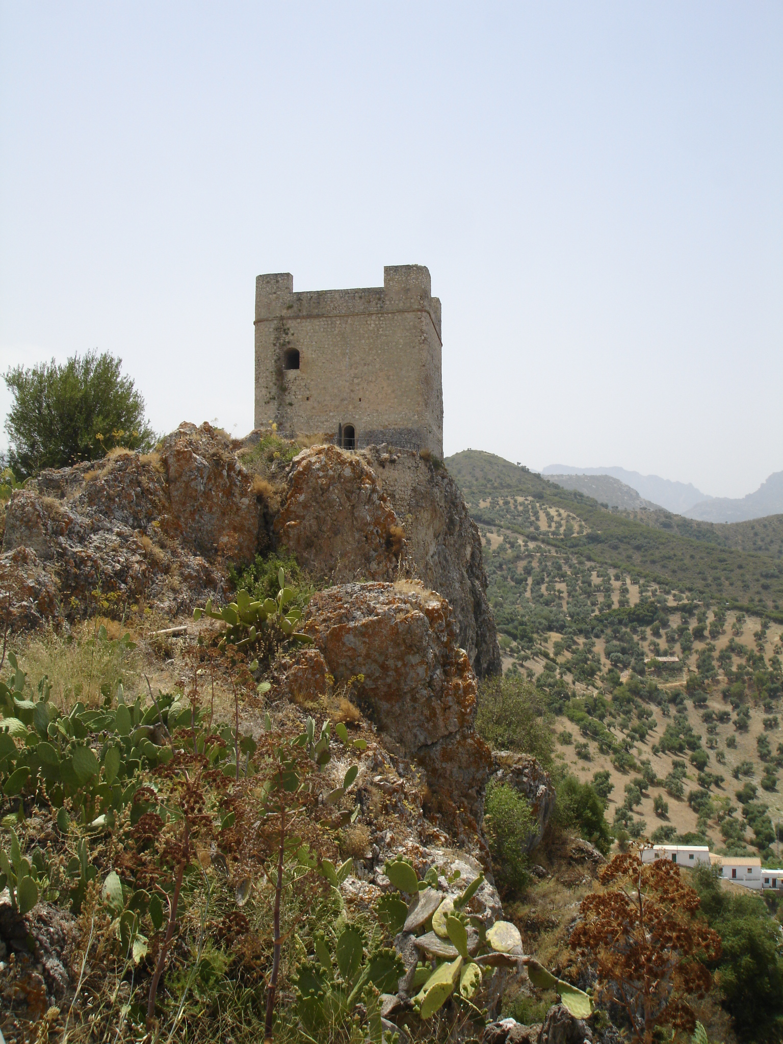 Zahara de la Sierra castle